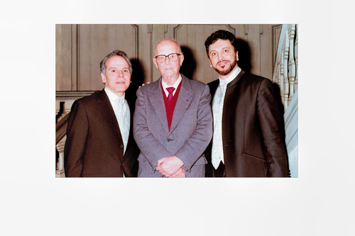 Maximiliano de Brito, Osvaldo Lacerda, Renato Mismetti